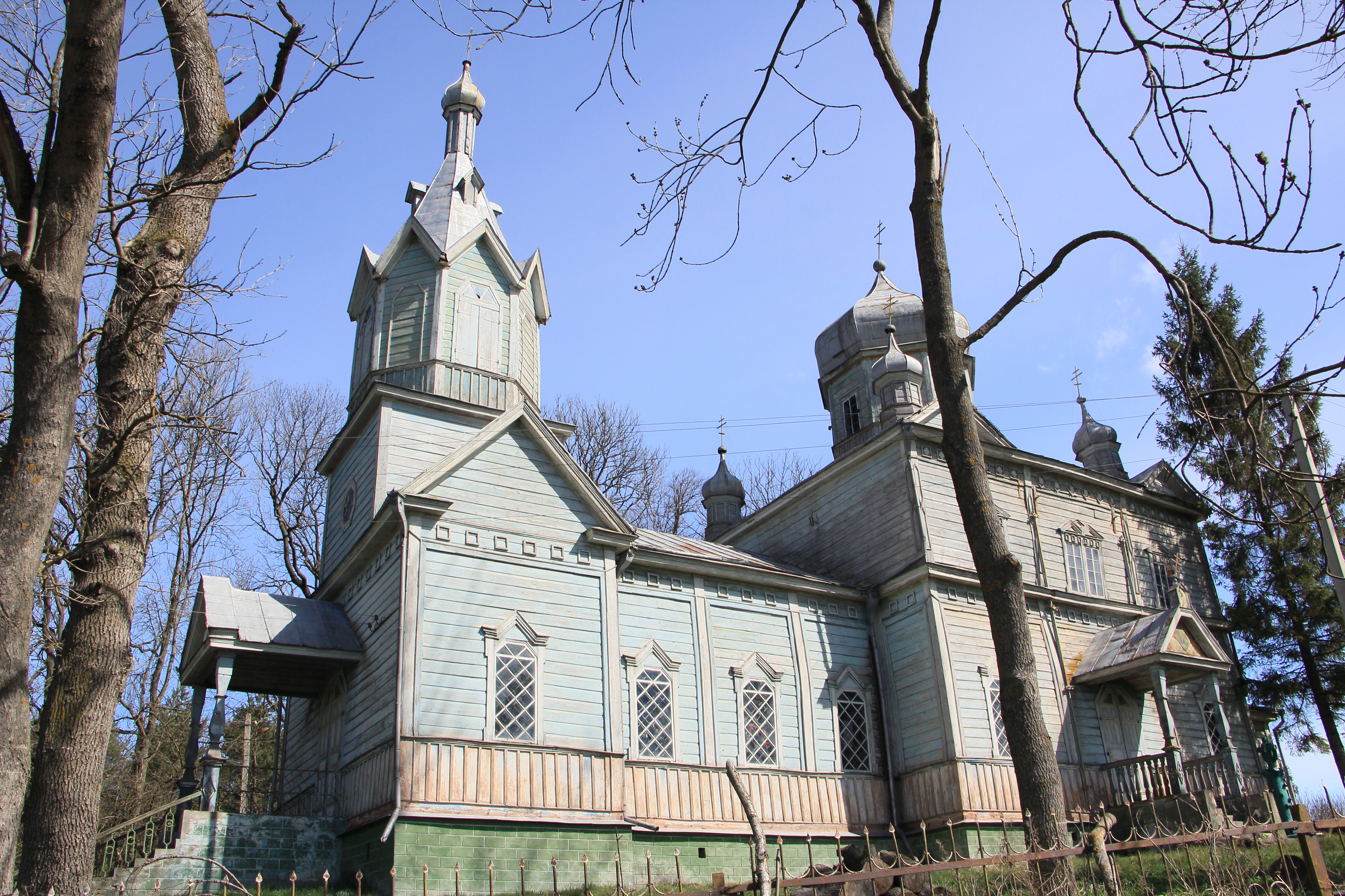 Дерев'на церква в селі Великі Вікнини Збаразького району, Тернопільської області